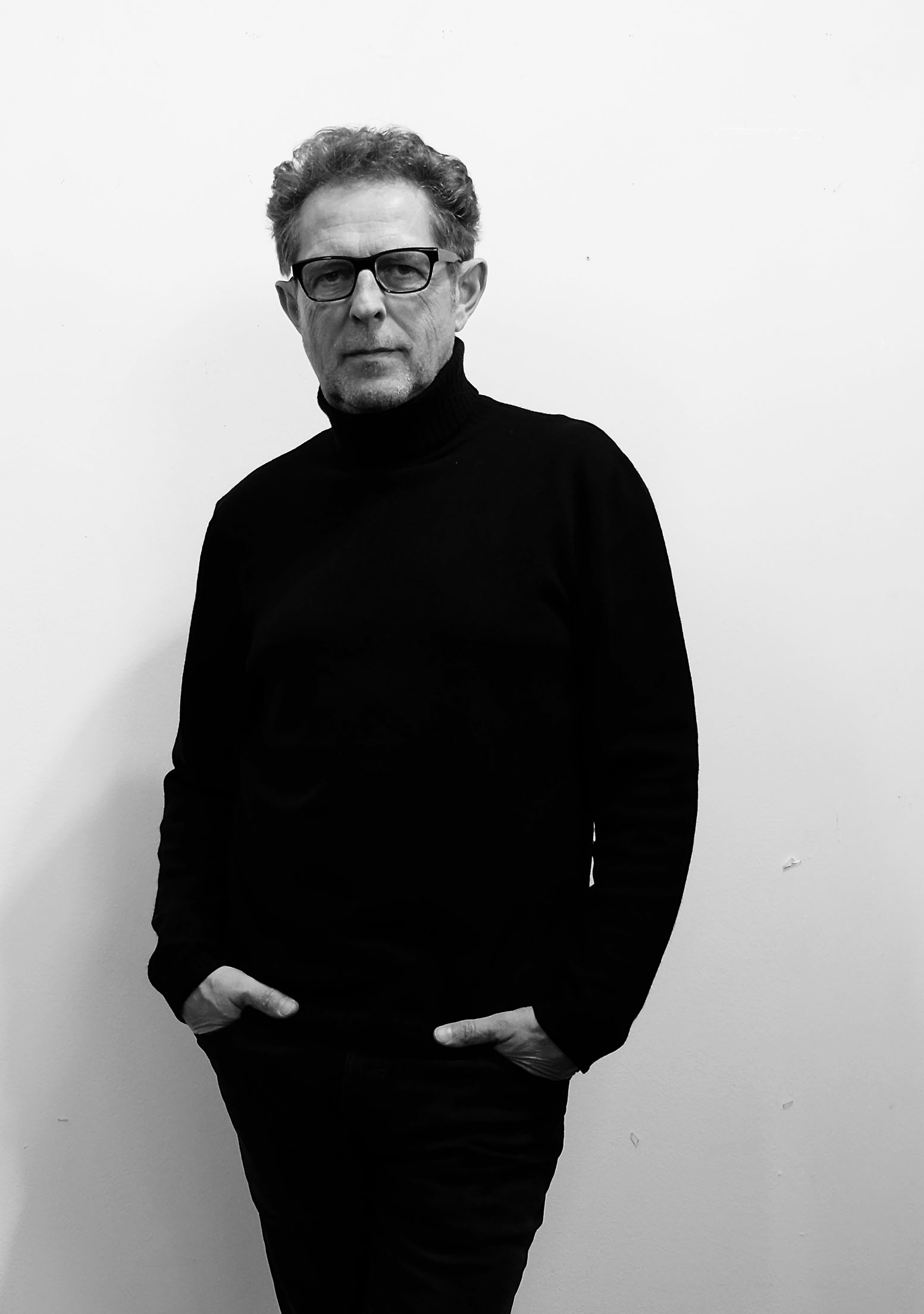 Herbert Nauderer (photo: A. Tepelmann, 2017)